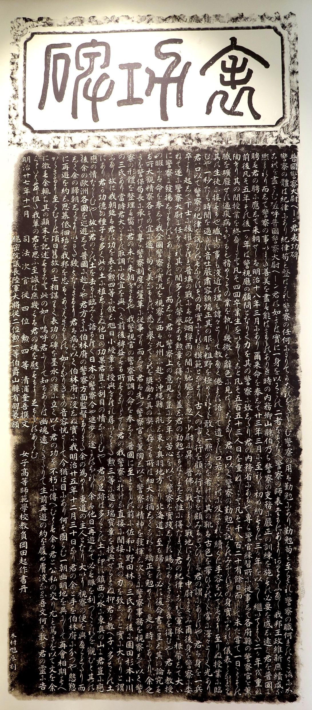 Copy of the inscription of an memorial stone in Tokyo for German police officer Höhn